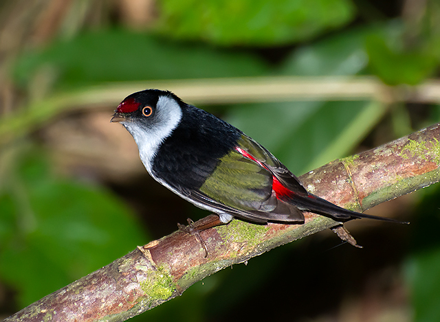 Pin-tailed manakin (Ilicura militaris)